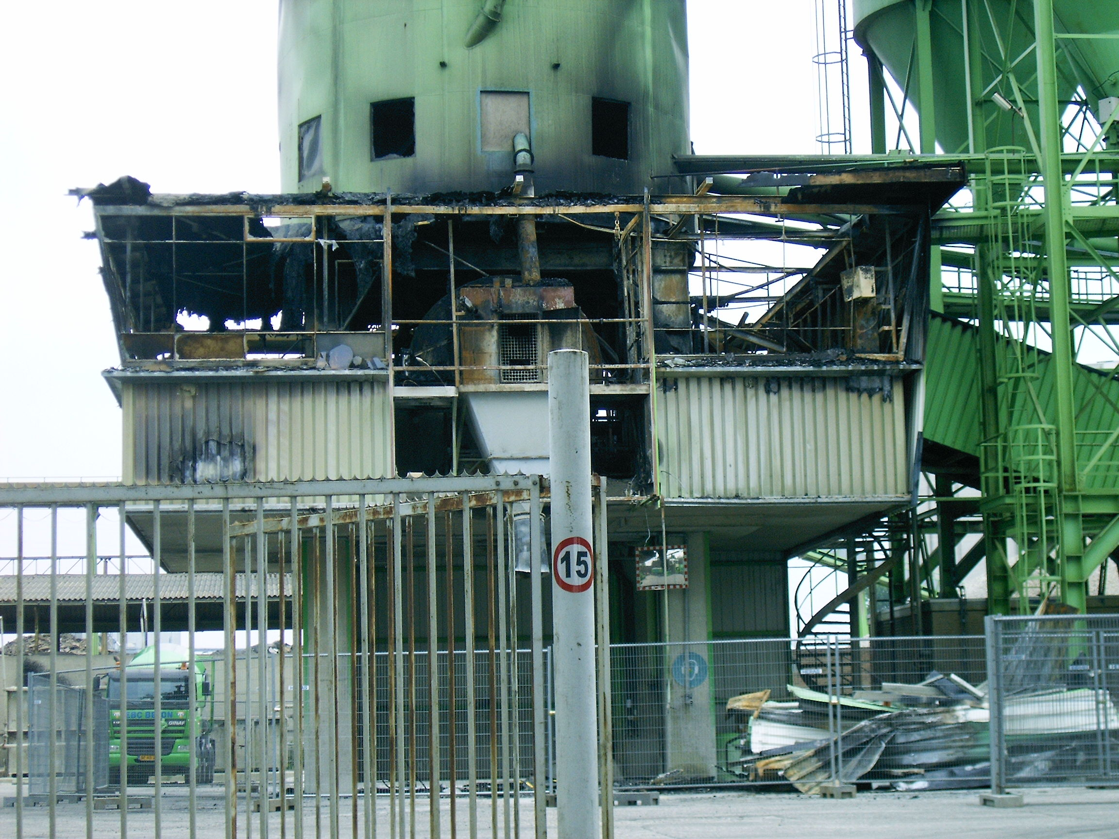 De Edese beton centrale na de brand op 22 mei 2008